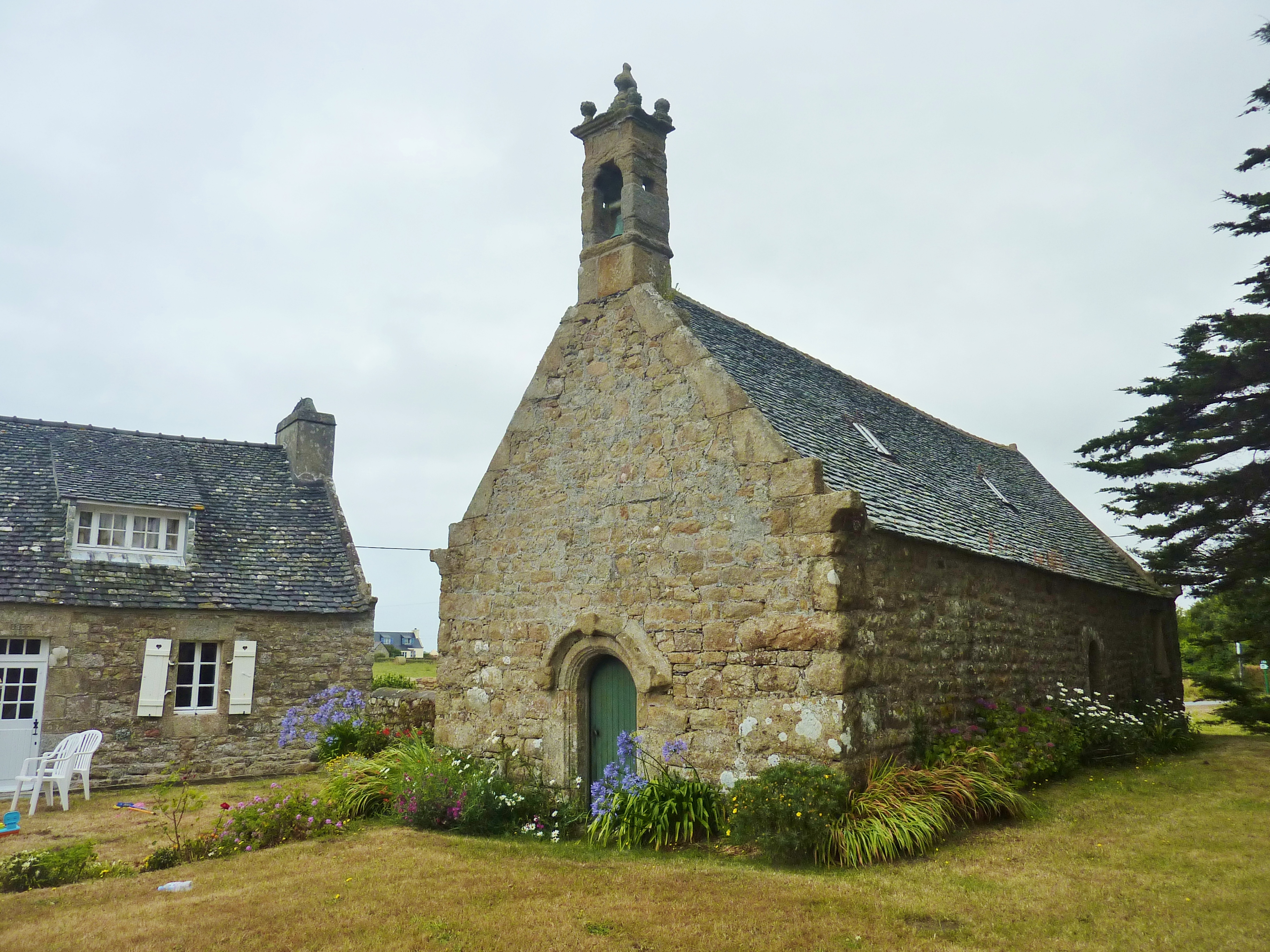 Plougasnou : la chapelle Saint-Samson (XVI-XVIIe siècles), construite selon la tradition en remplacement d'une chapelle ruinée, elle-même construite à l'emplacement où saint Samson se serait embarqué pour se rendre en Grande-Bretagne.